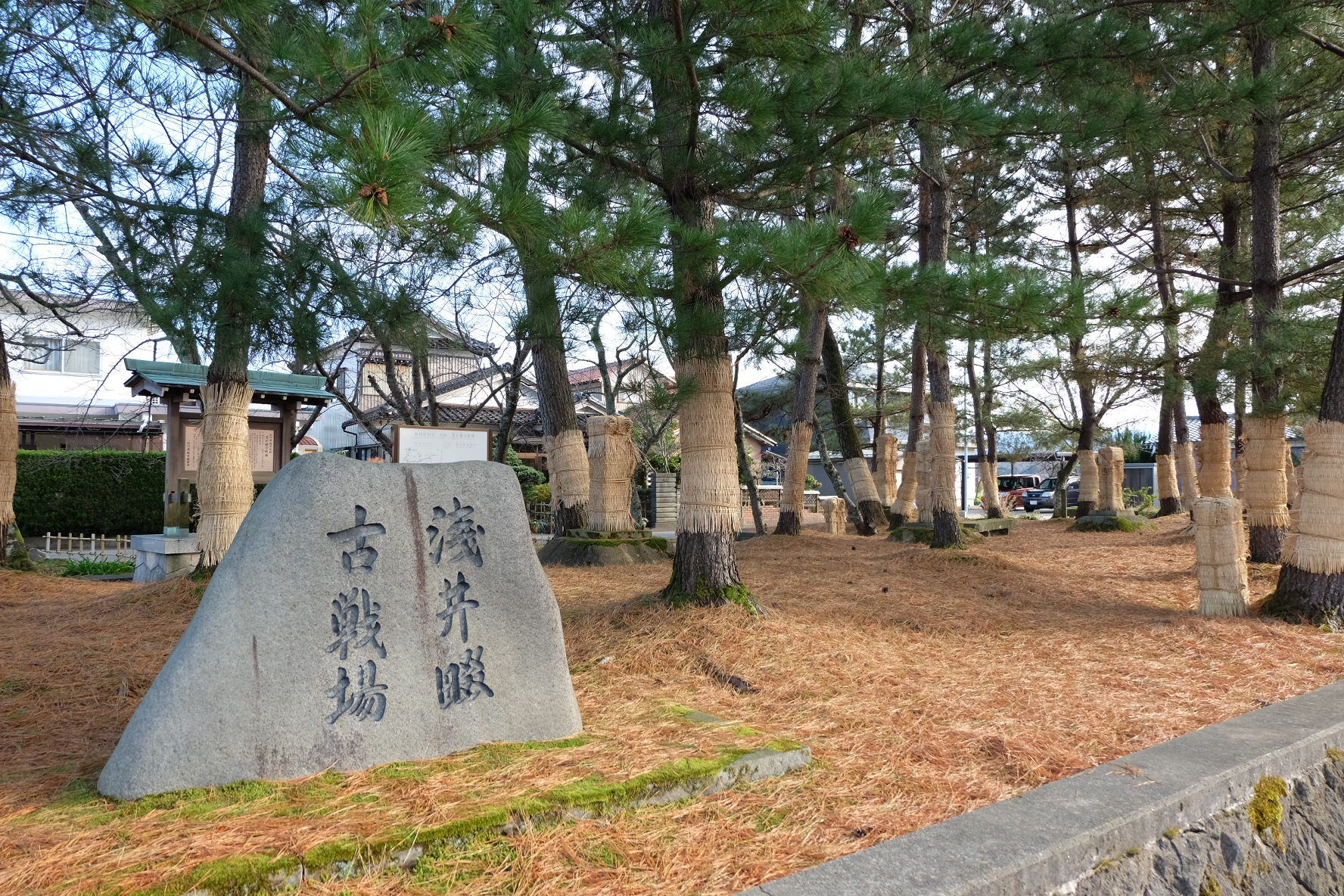 浅井畷古戦場